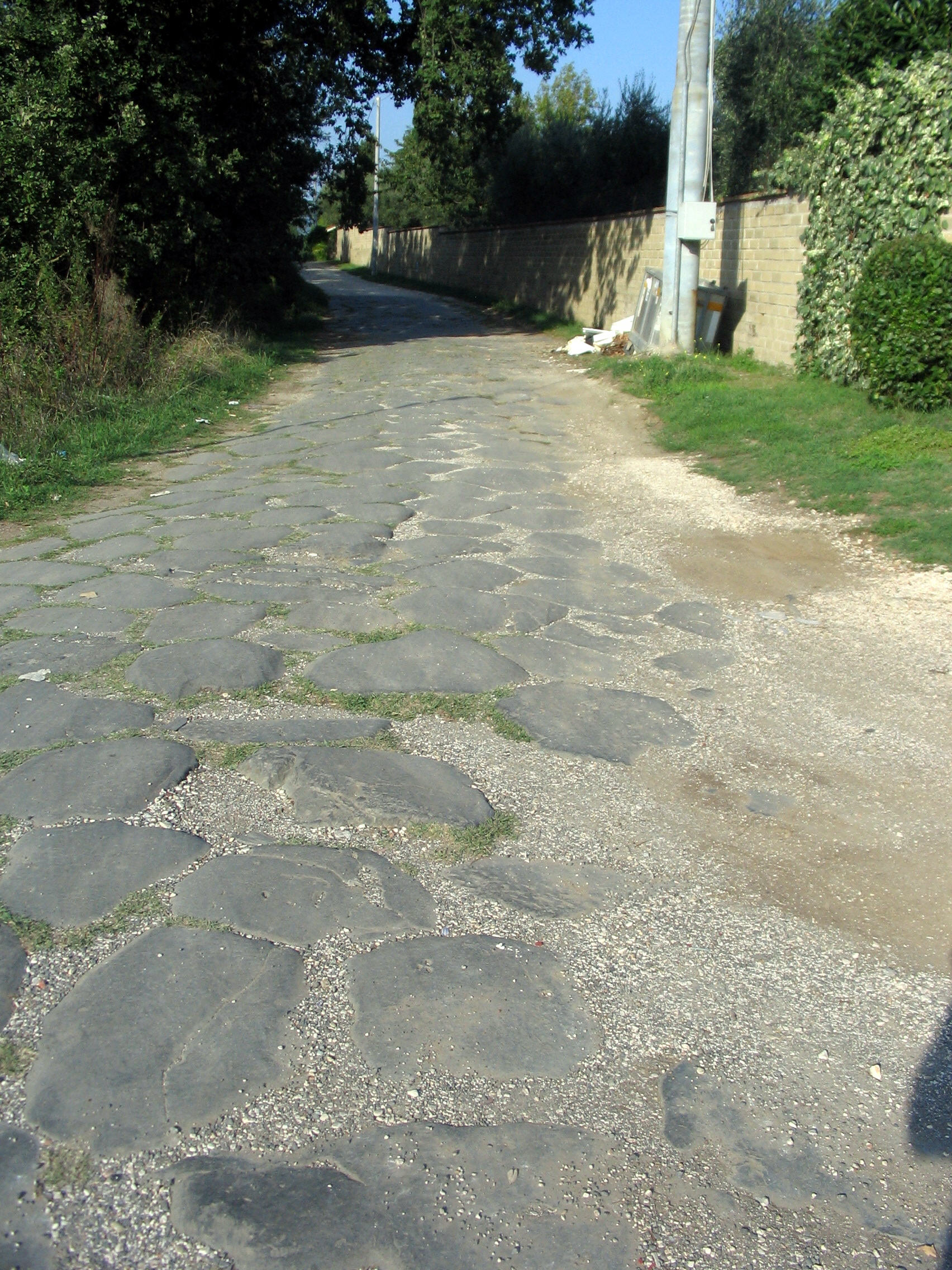 Rignano Flaminio, Lazio, Italia